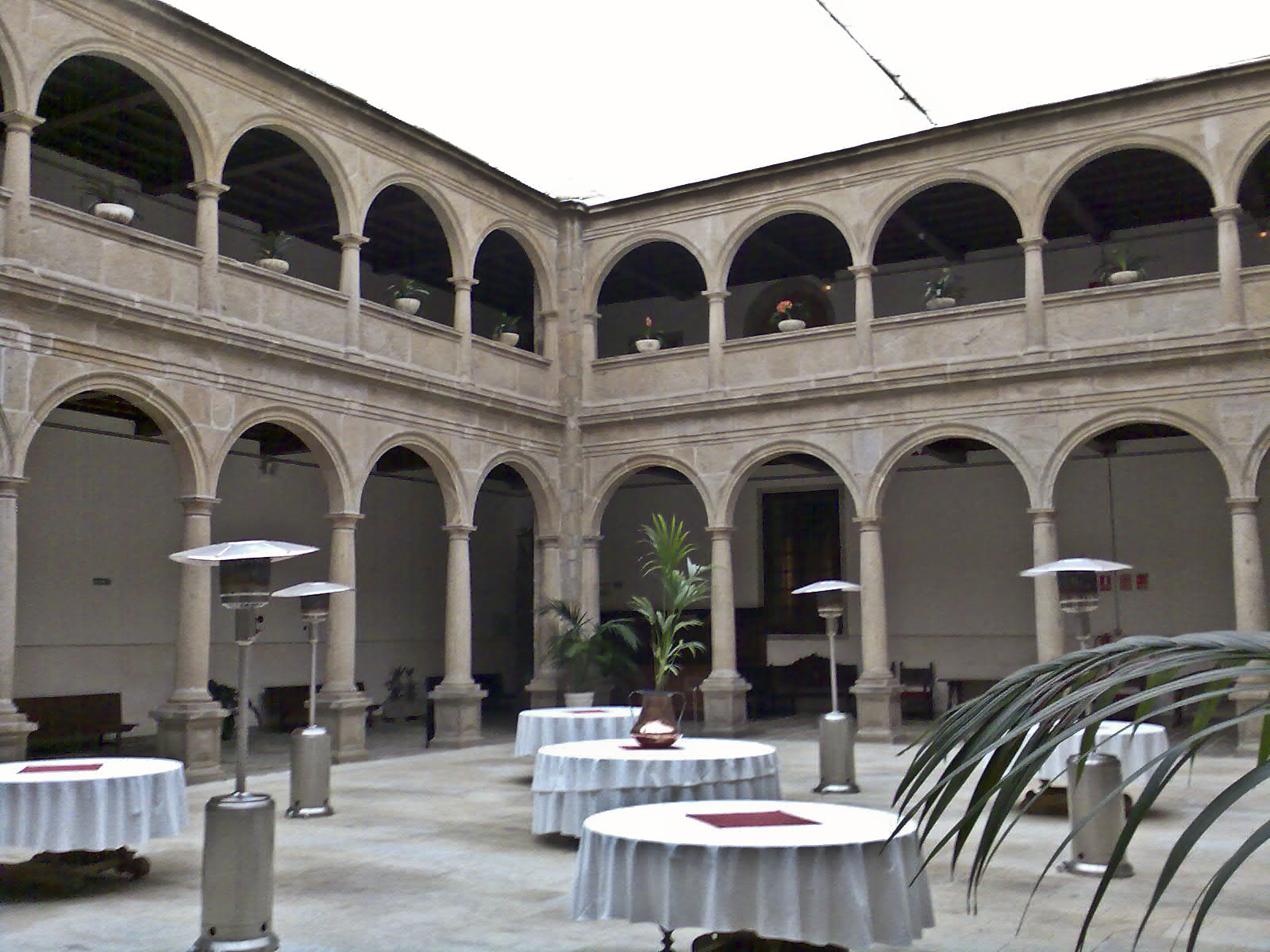 Claustro do Convento de San Francisco do Val de Deus en Santiago de Compostela- Galicia